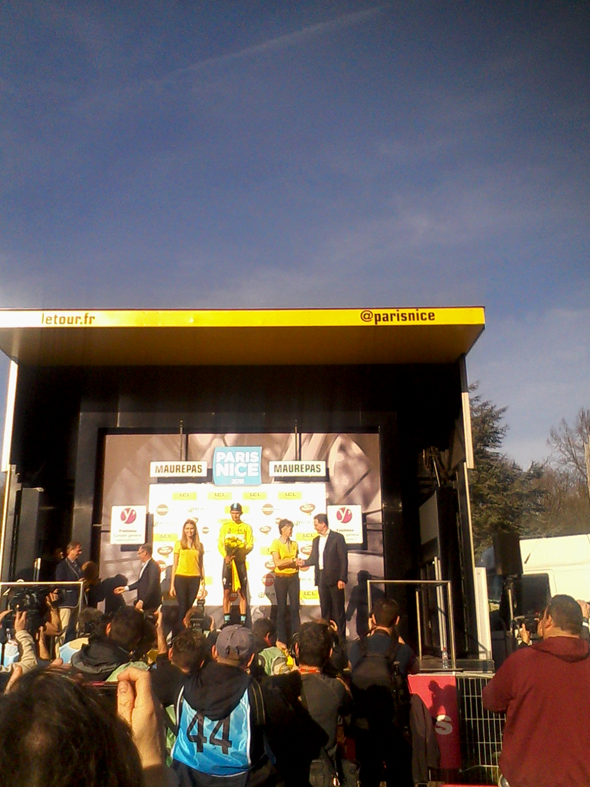 Michal Kwiatkowski, champion de Pologne de la spécialité, s'empare du maillot jaune après le prologue de Paris-Nice 2015